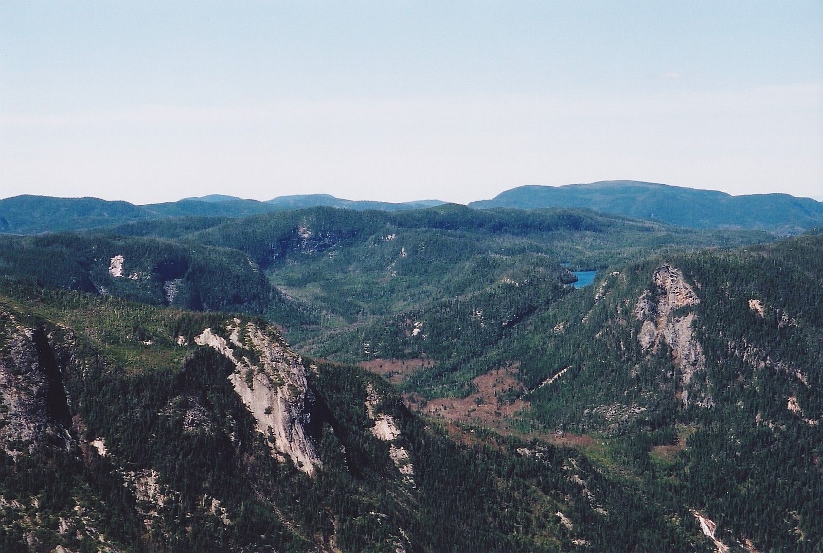 Le massif des Laurentides dans le Parc national des Hautes-Gorges (Charlevoix, Québec, Canada); Laurentian mountains in the Hautes-Gorges national park (Charlevoix, Quebec, Canada)